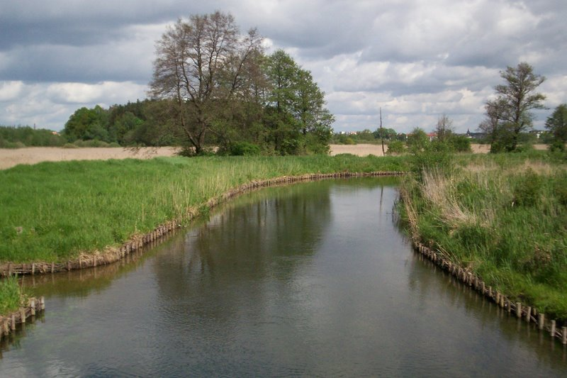 Koryto rzeki Łyny, Olsztyn, os. Brzeziny.